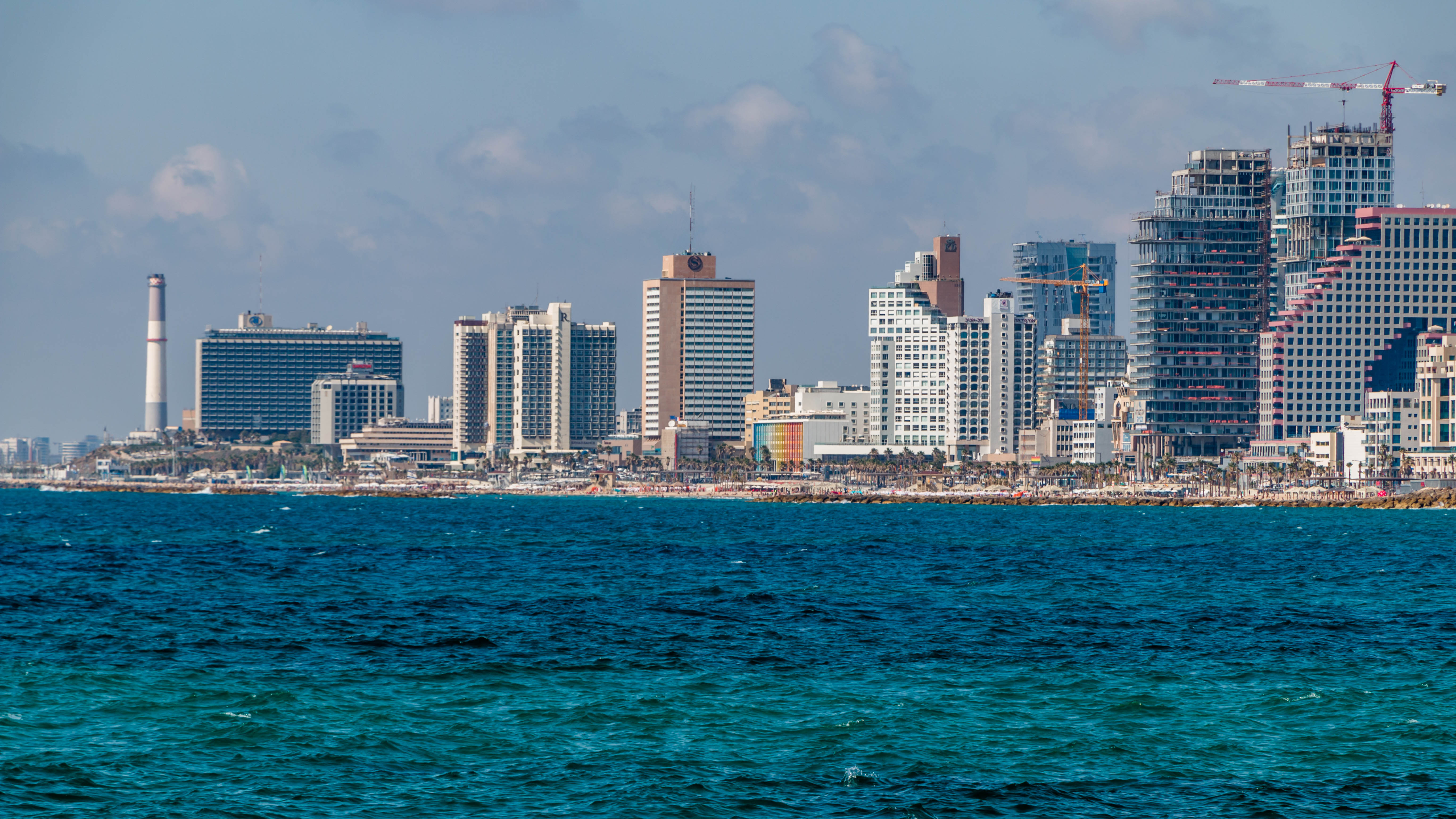 רצועת החוף של תל אביב והבניינים לאורכה